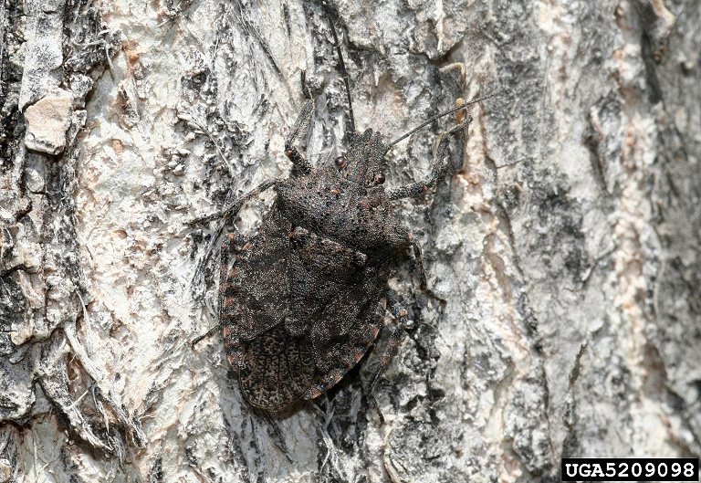 Brochymena sulcata; family Pentatomidae